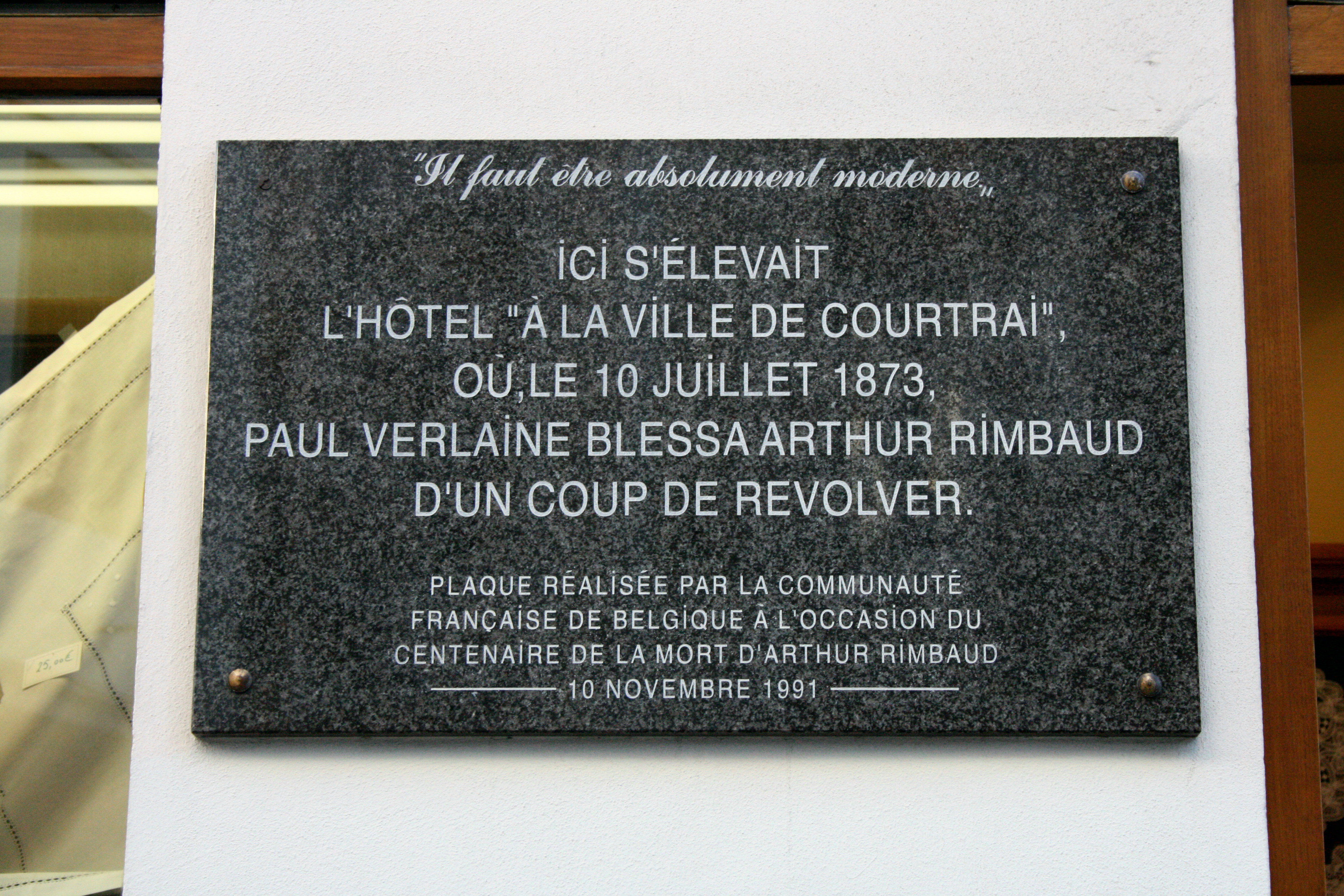 Plaque commémorative, rue des Brasseurs 1, Bruxelles (Belgique) où Paul Verlaine tira sur Arthur rimbaud